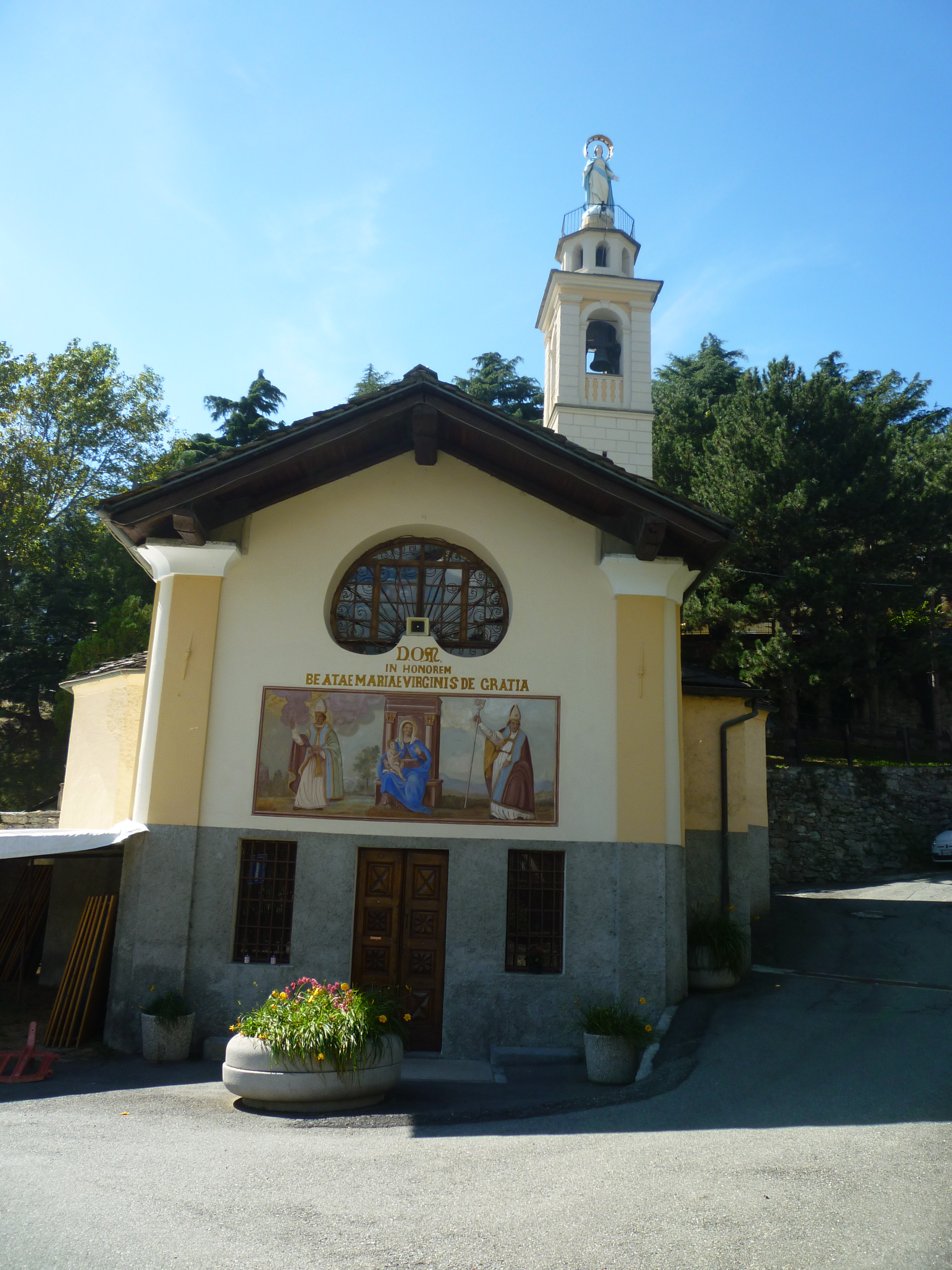 église ND des Grâces à (Châtillon, Vallée d'Aoste)